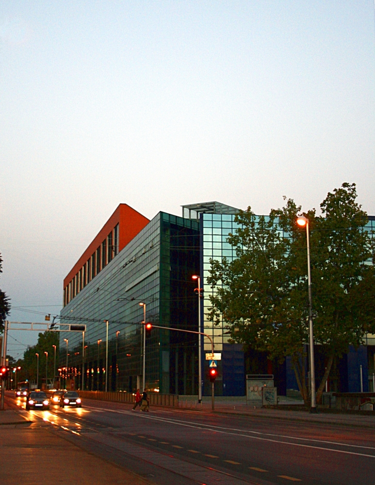 Maksimirski stadion, Zagreb